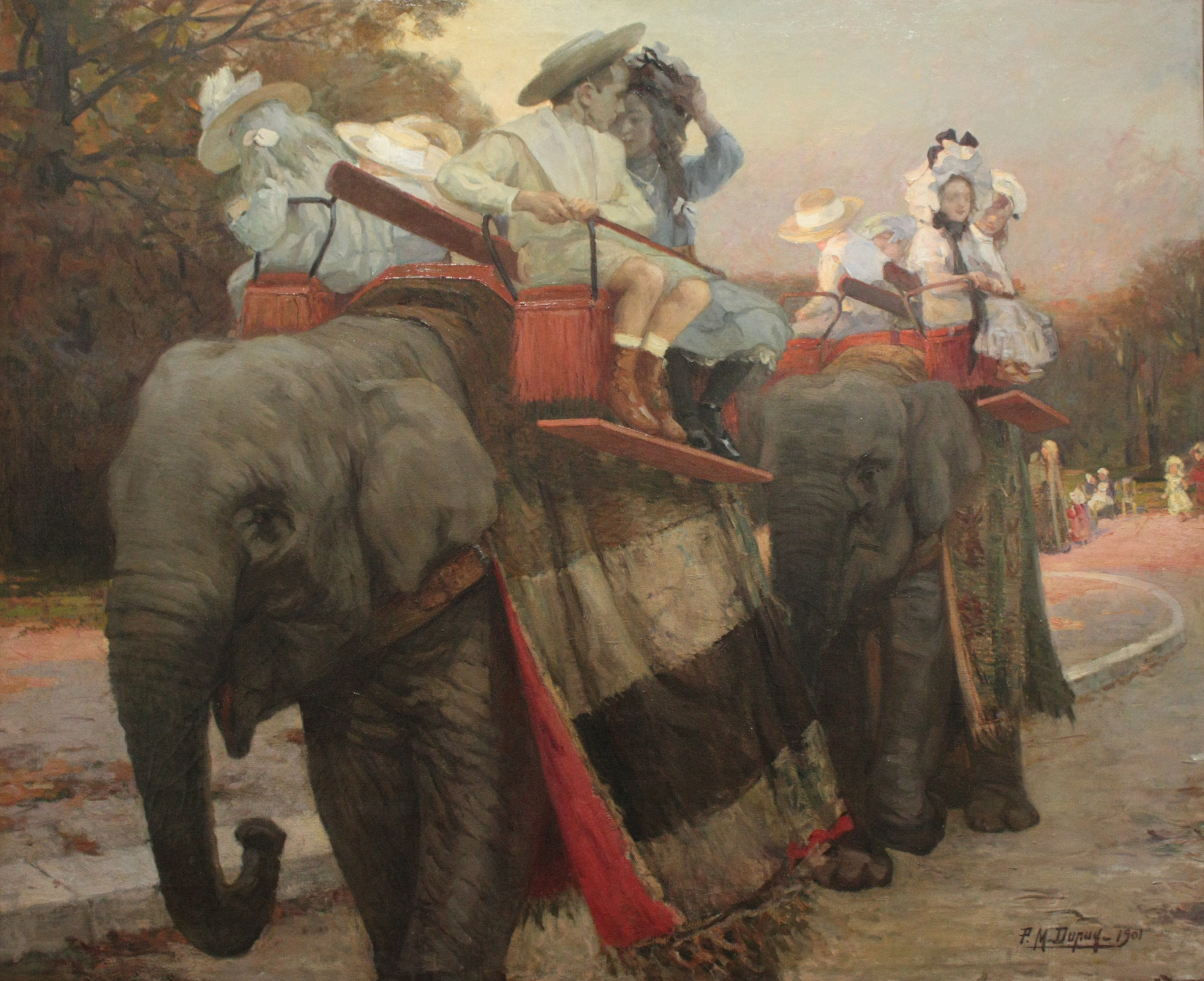 "Au jardin d'acclimatation : les éléphants" par Paul Michel Dupuy, 1901.